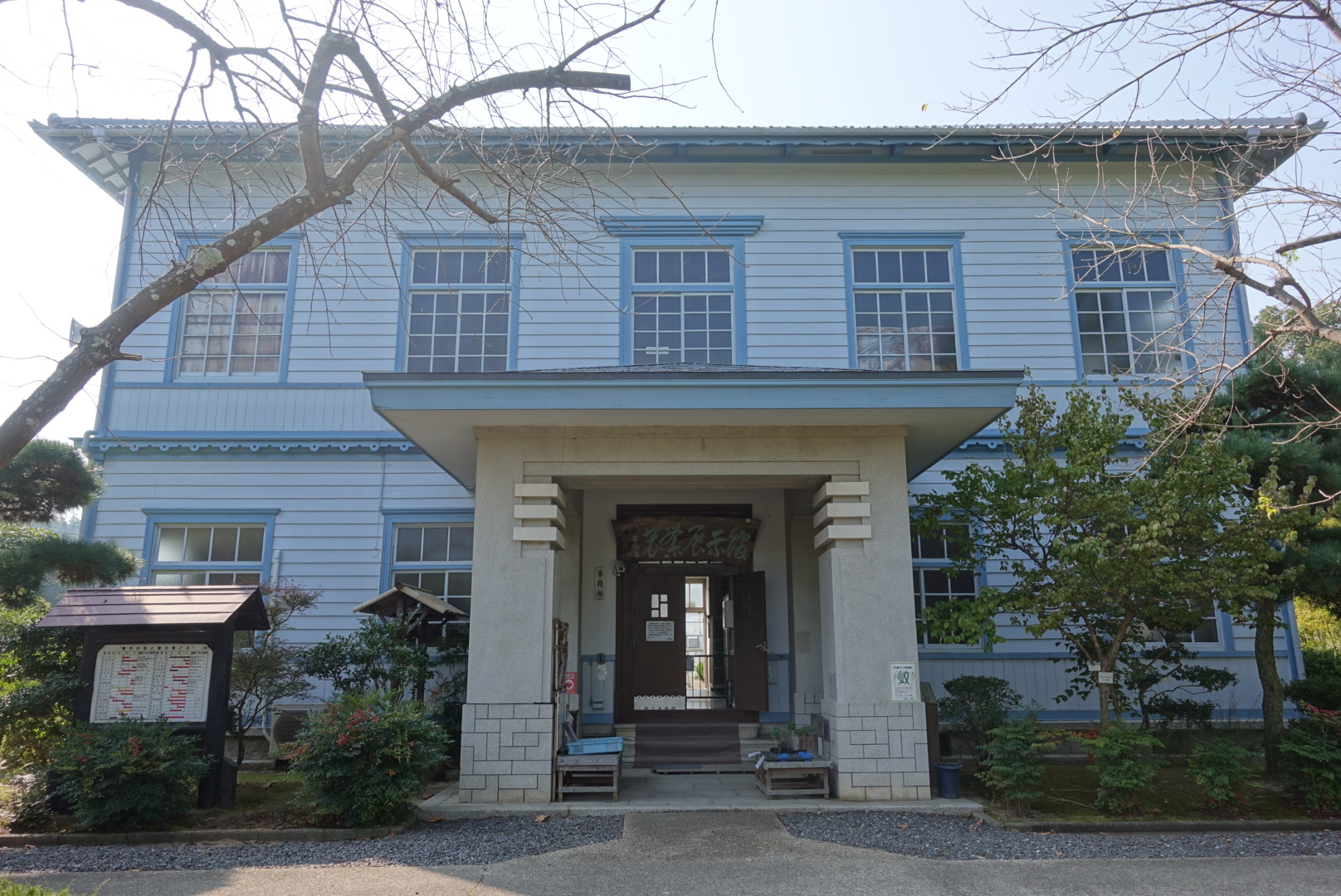 岡山市上道にある三徳園